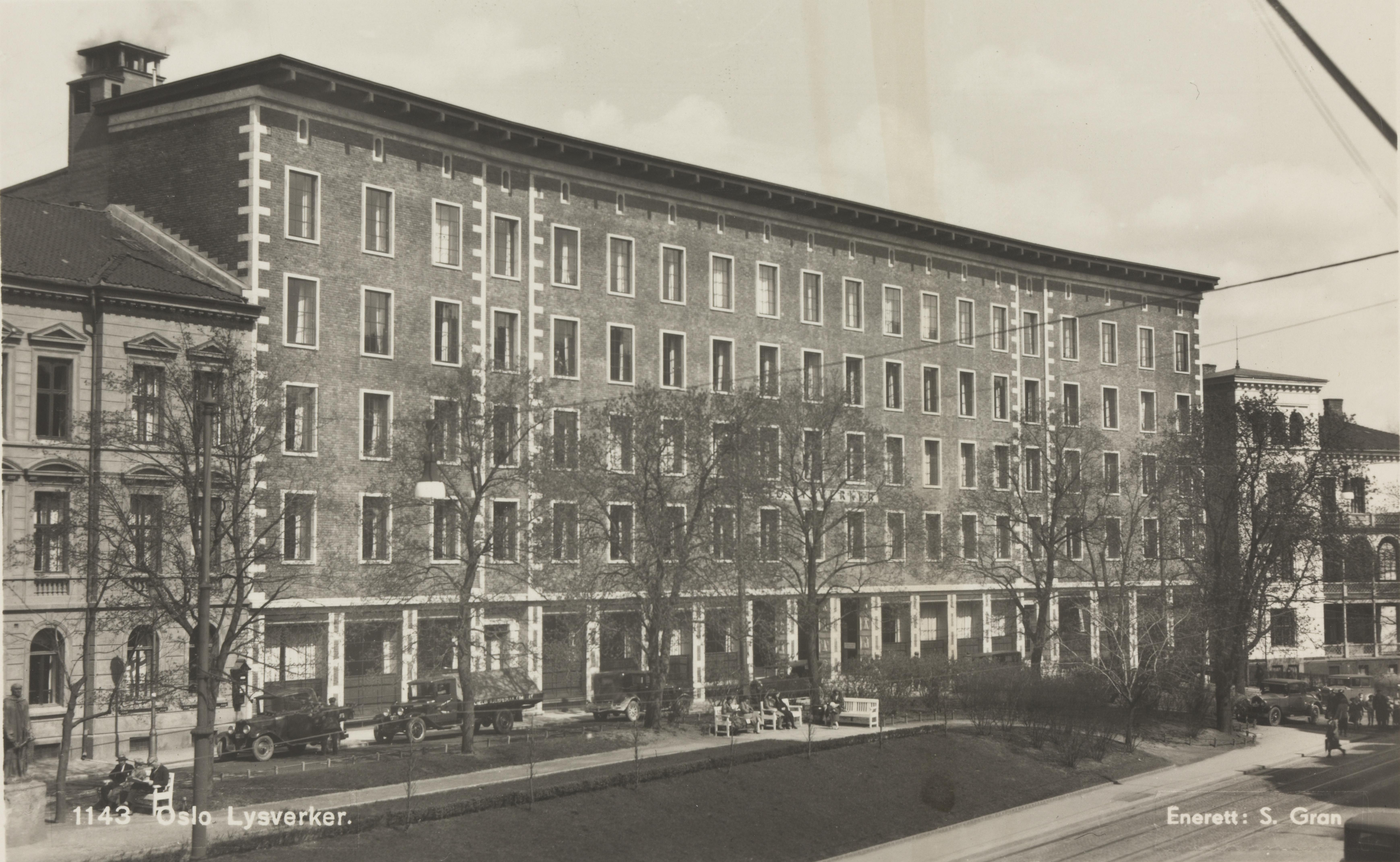 Bildet er hentet fra Nasjonalbibliotekets bildesamling Lysverket,Solli plass, Oslo, Oslo